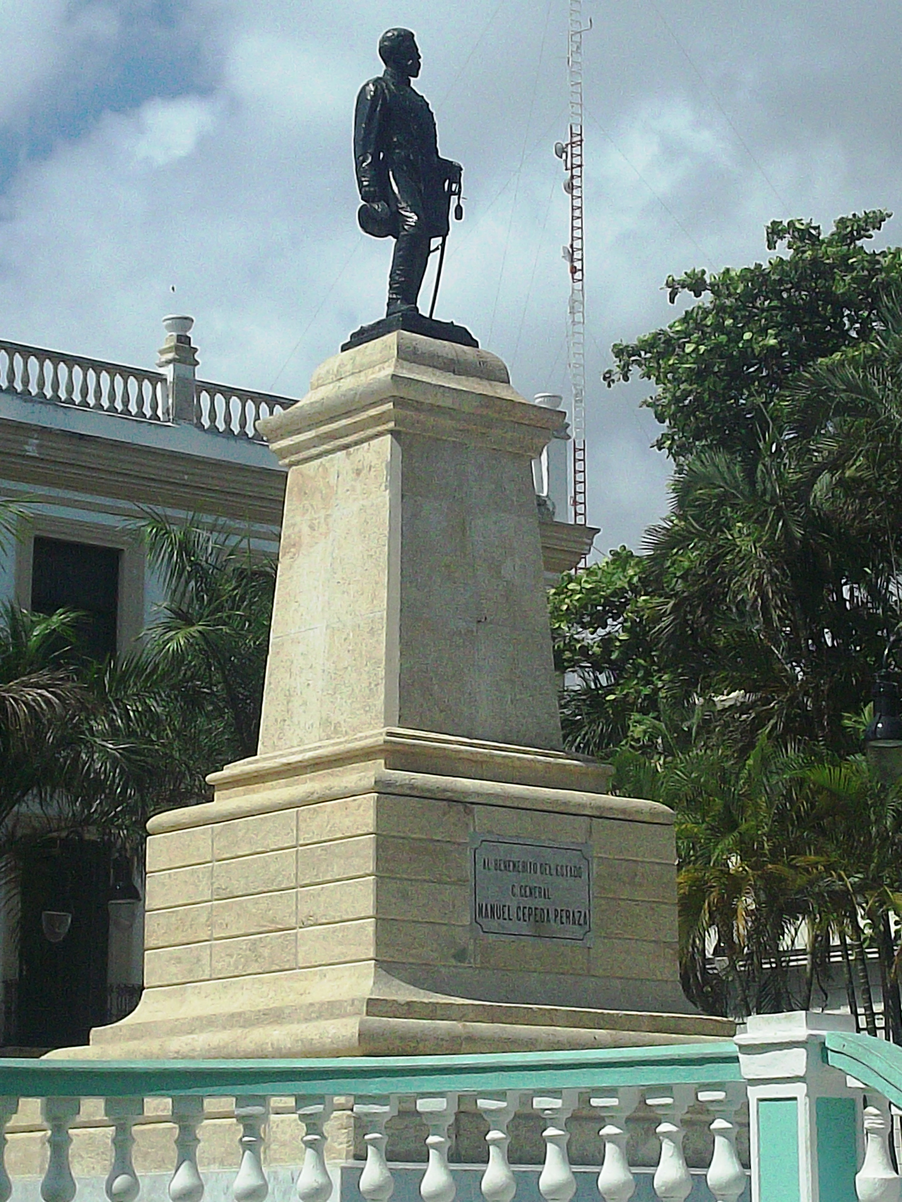 Estatua erigida por el gobierno de Yucatán en 1886 al Gral. Manuel Cepeda Peraza. Por la antigüedad del monumento y por la libertad de panorama, está en dominio público y puede ser fotografiado libremente.